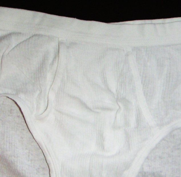 Doppelripp, Detail einer Herrenunterhose